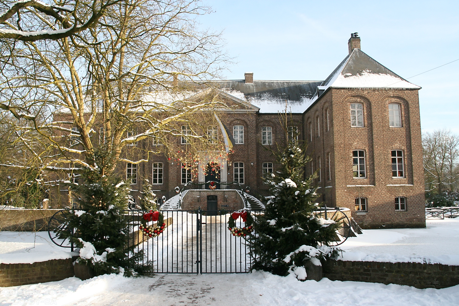 Arcen: kasteel Arcen - hoofdgebouw